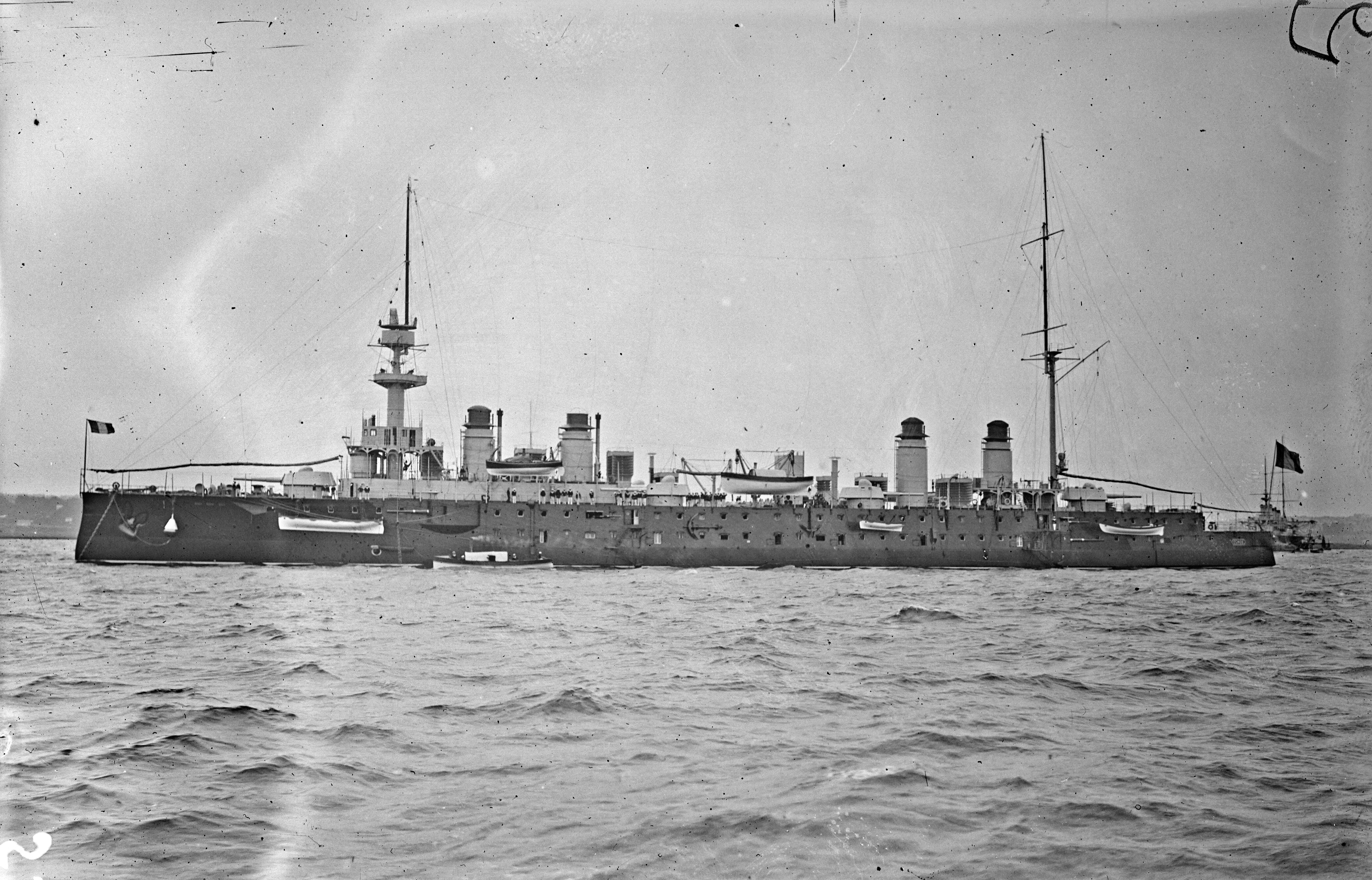 Visite de l'escadre anglaise, le 10 juillet 1905 : Condé en rade de Brest.